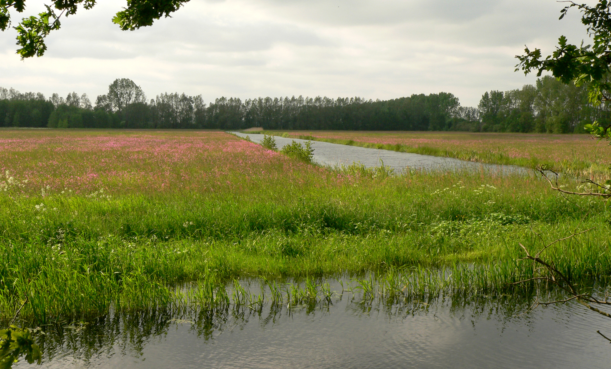 Feuchtwiesen und Entwässerungsgraben im Naturschutzgebiet Nördlicher Drömling innerhalb des Naturschutzgebietes Ohre-Drömling, Sachsen-Anhalt